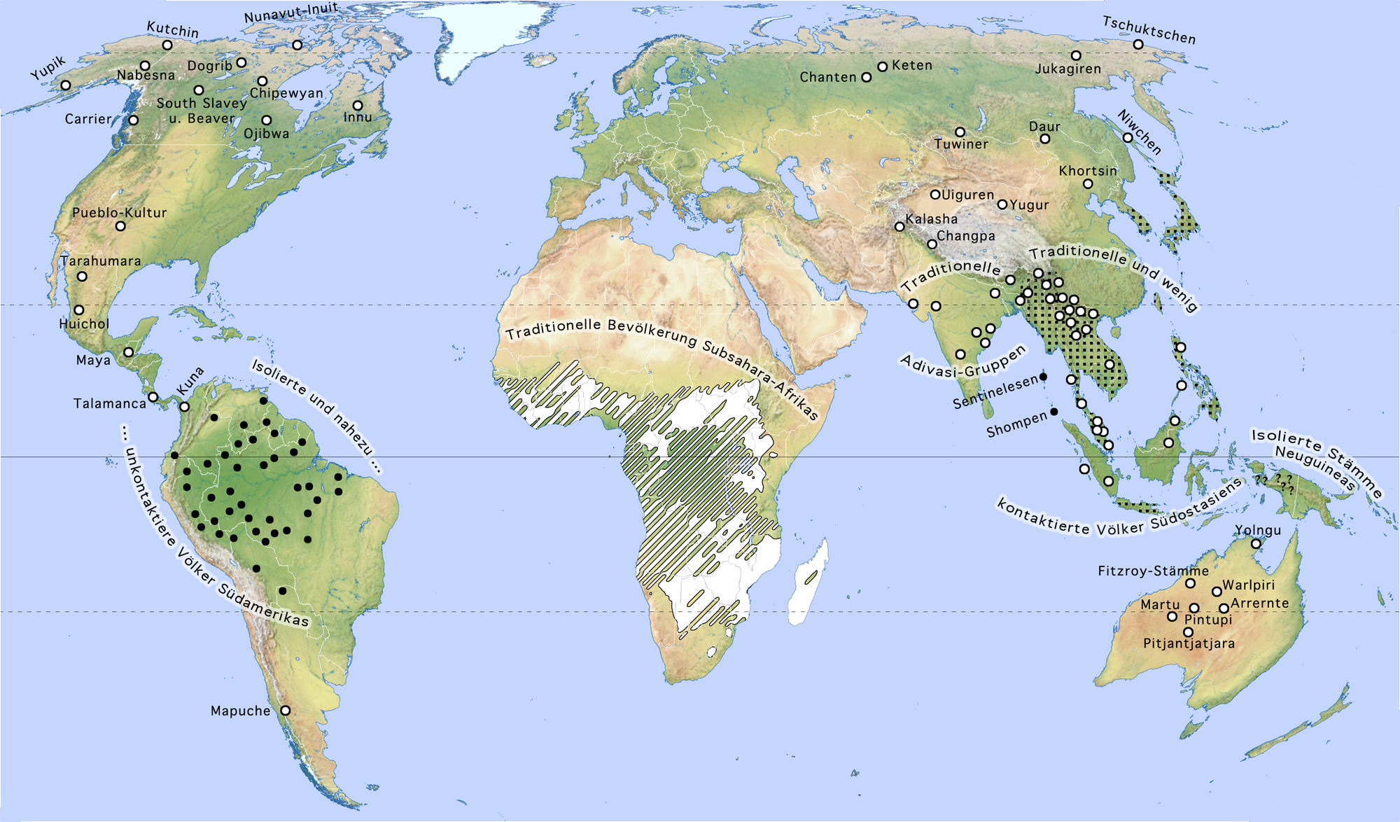 Dokumentierte Vorkommen traditioneller Schamanen und ähnlicher Geisterbeschwörer bzw. religiös-spiritueller Spezialisten mit verschiedenen sozialen Funktionen um den Beginn des 21. Jahrhunderts